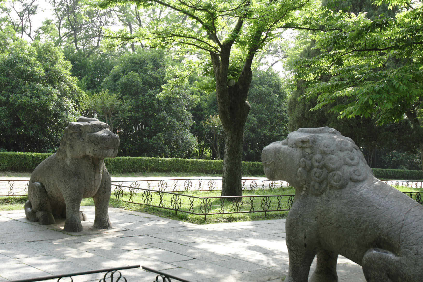 Ming Xiaoling Mausoleum; 明孝陵 at Nanjing